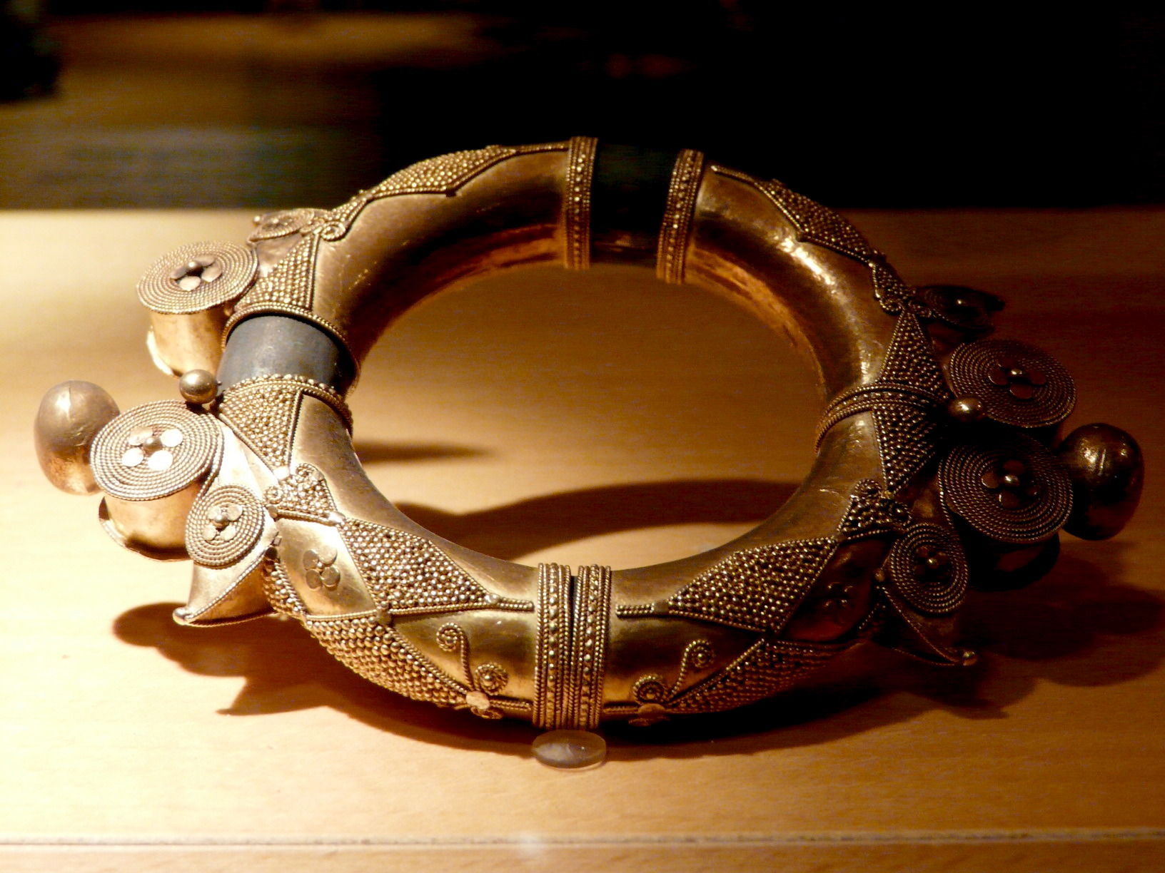 Bracelet worn by a village headman Karo Batak, North Sumatra, Indonesia gold early 20th century Foto gemaakt tijdens Wiki Loves Art Nederland workshop in het Tropenmuseum in Amsterdam op 26 juni 2009. Photo taken at Wiki Loves Art Netherlands workshop in the Tropenmuseum in Amsterdam on 26 June 2009.